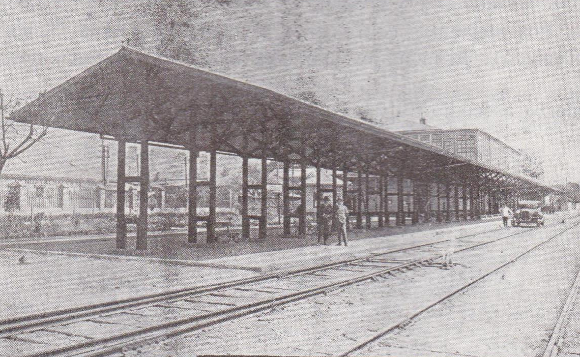 Estaciones del sur, estación de Valdivia. Circa 1929. Imagen obtenida a partir del libro (in Spanish) (1929) Ferrocarriles del Estado de Chile (3rd ed.), Santiago: Impr. Harris y Pascual